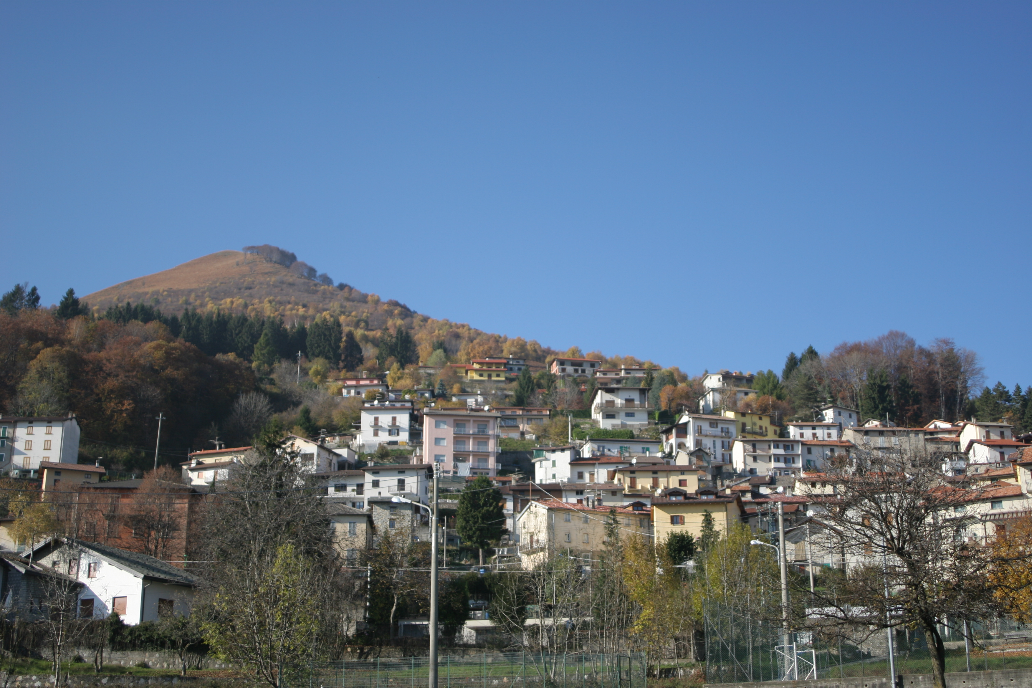 Gemaakt op 3 november met een EOS 20D